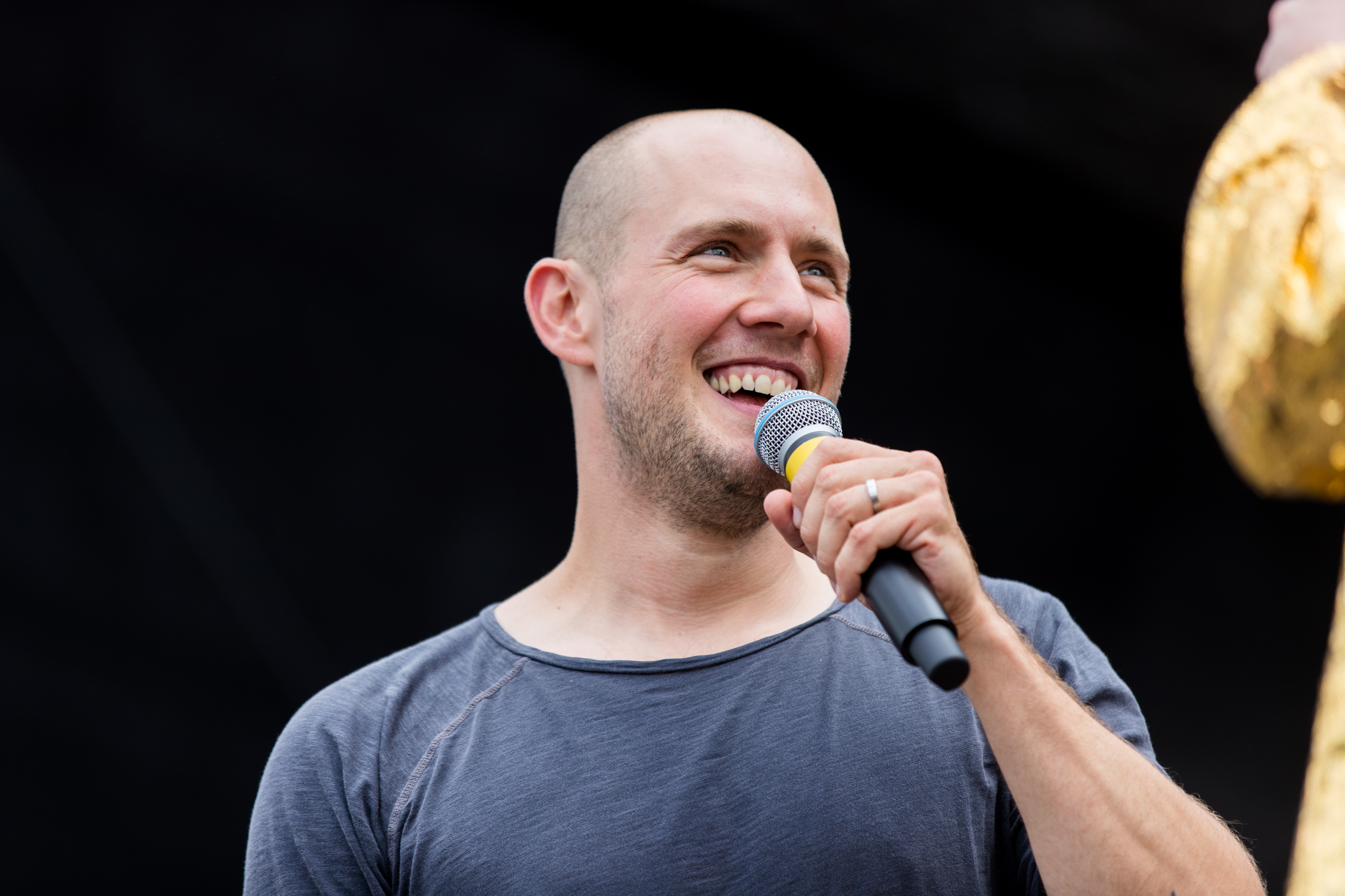 Oli.P & Jack Gelee during La Ola Mannheim at Maimarktgelände, Mannheim, Baden Württemberg, Germany on 2016-07-09, Photo: Sven Mandel